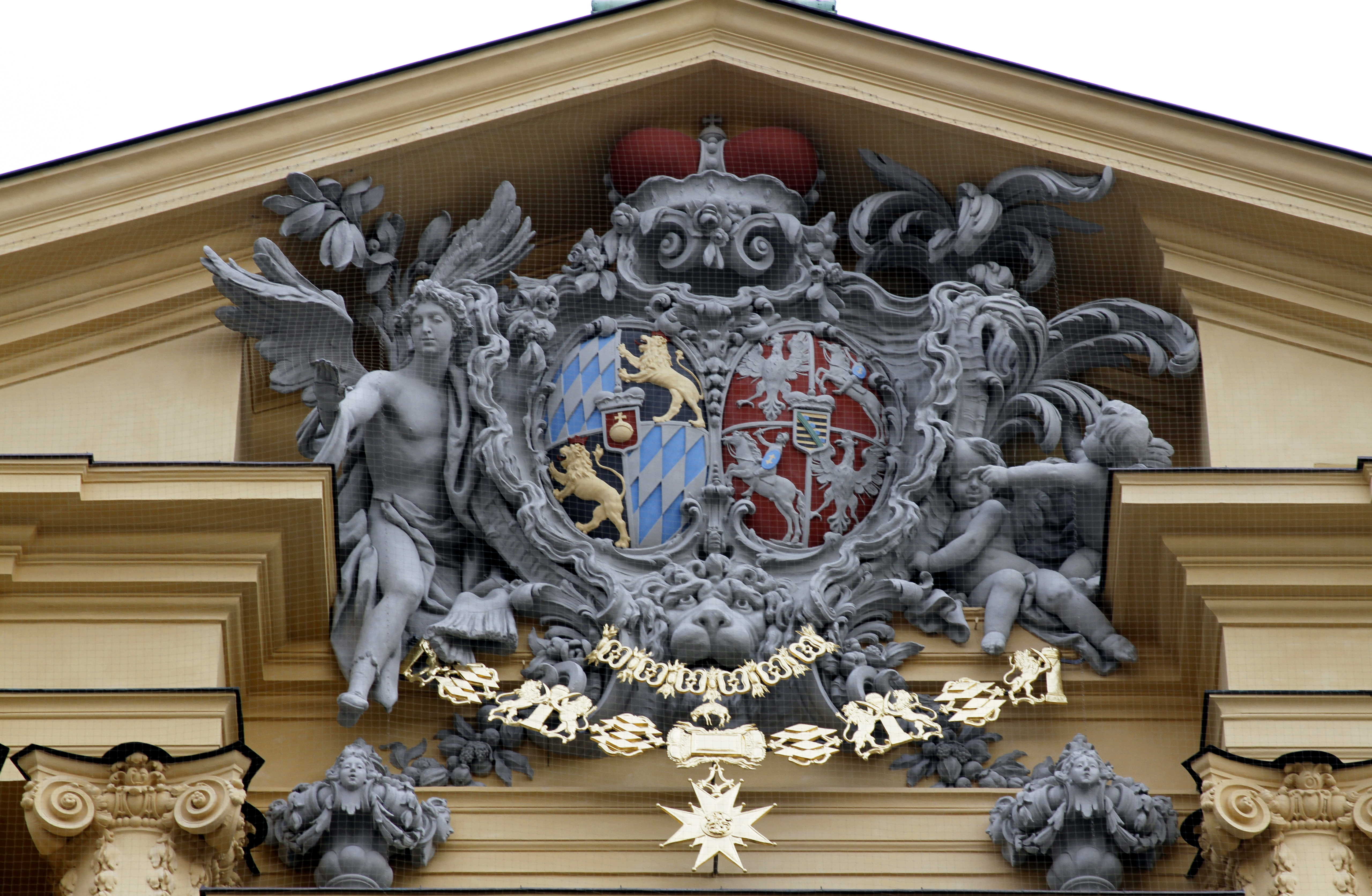 Theatinerkirche - Munich - Germany